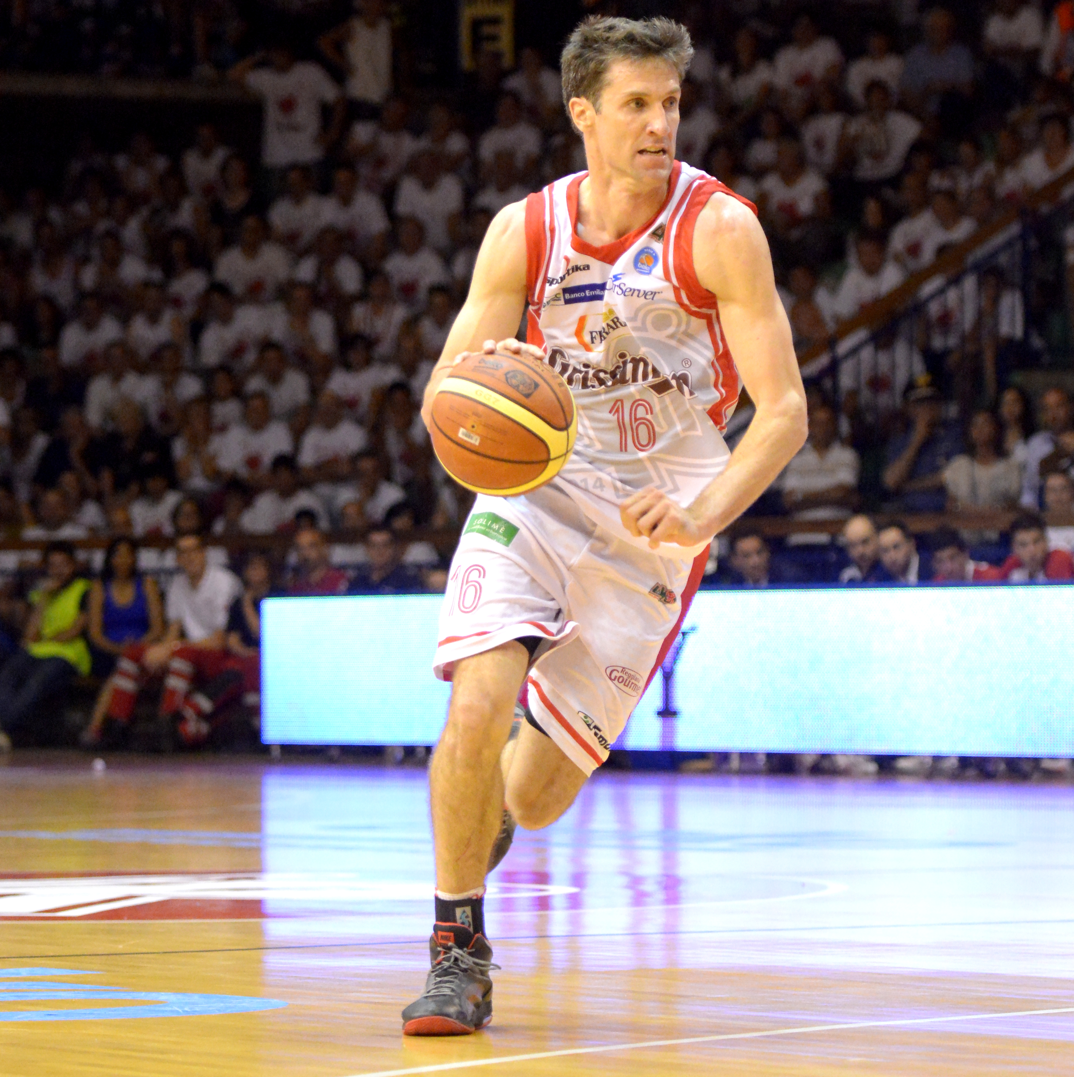 Drake Diener in azione con la maglia di Reggio Emilia nella finale 7 dei play-off contro Sassari